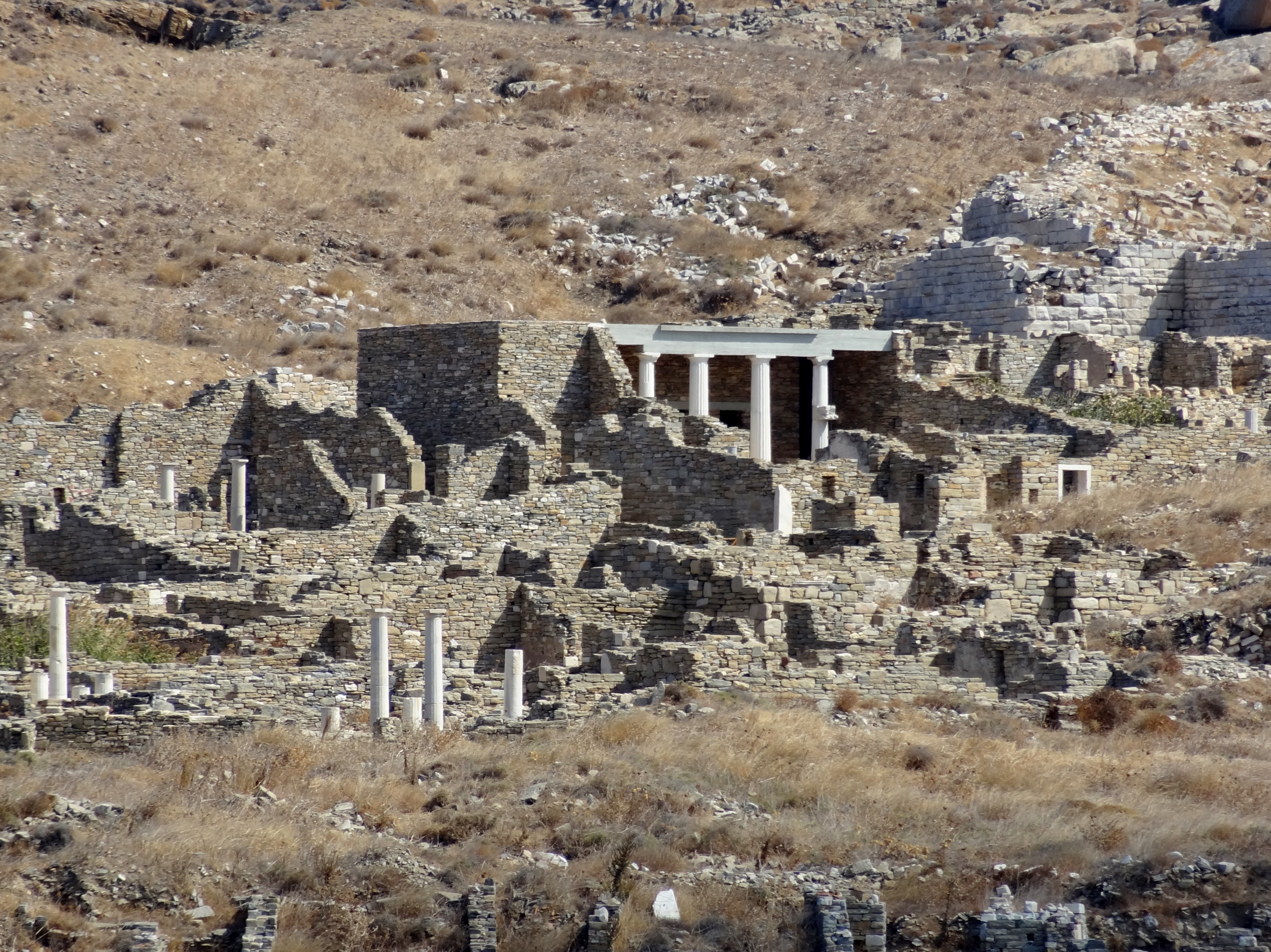 Theaterviertel auf Delos, Kykladen, Griechenland